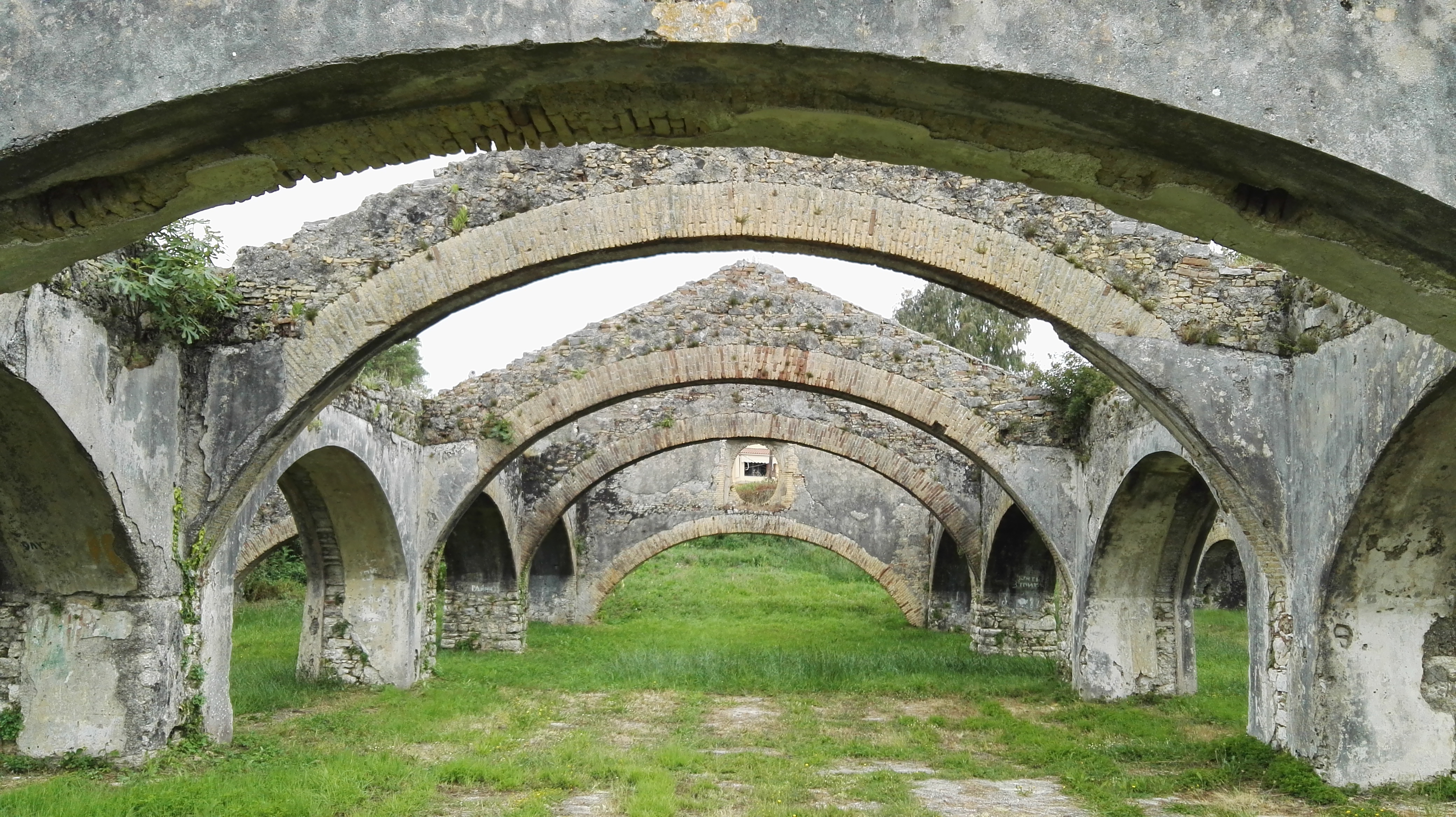 Ruinen einer venzianischen Schiffswerft in Gouvia auf Korfu